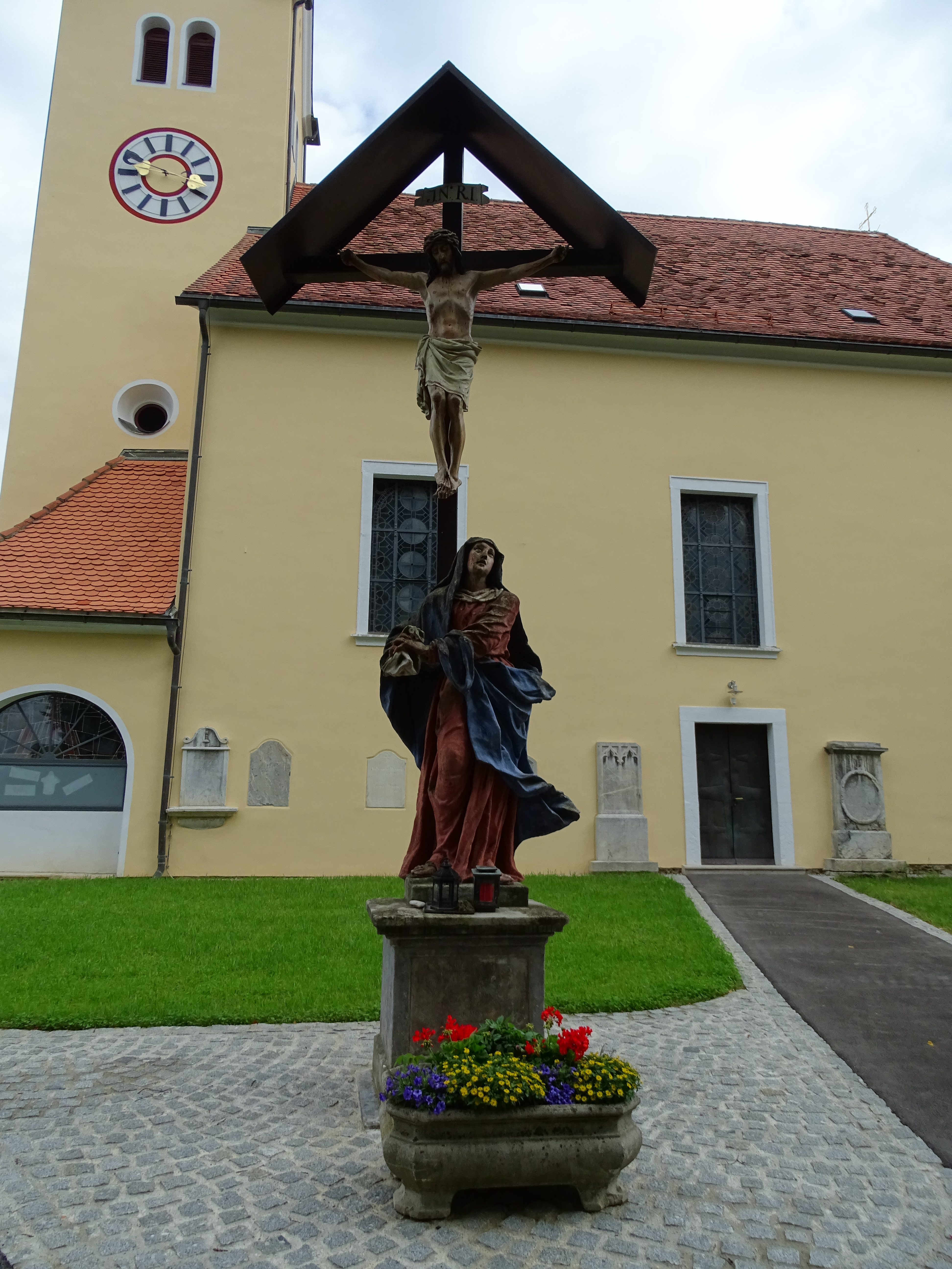 Das ehemalige Friedhofskreuz neben der Pfarrkirche Gratkorn